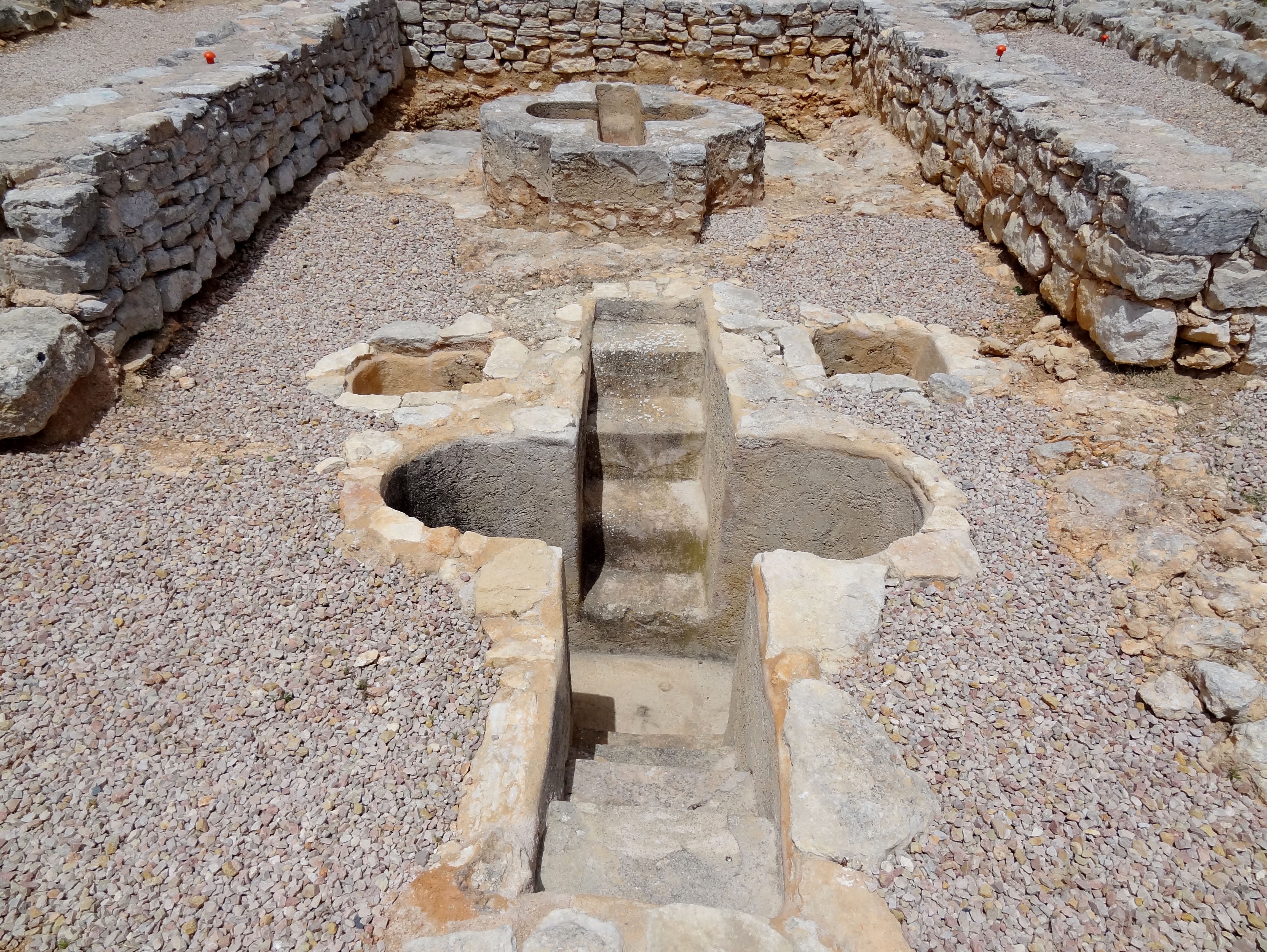 Ausgrabungsstätte der Basílica de Son Peretó, Gemeinde Manacor, Mallorca, Spanien